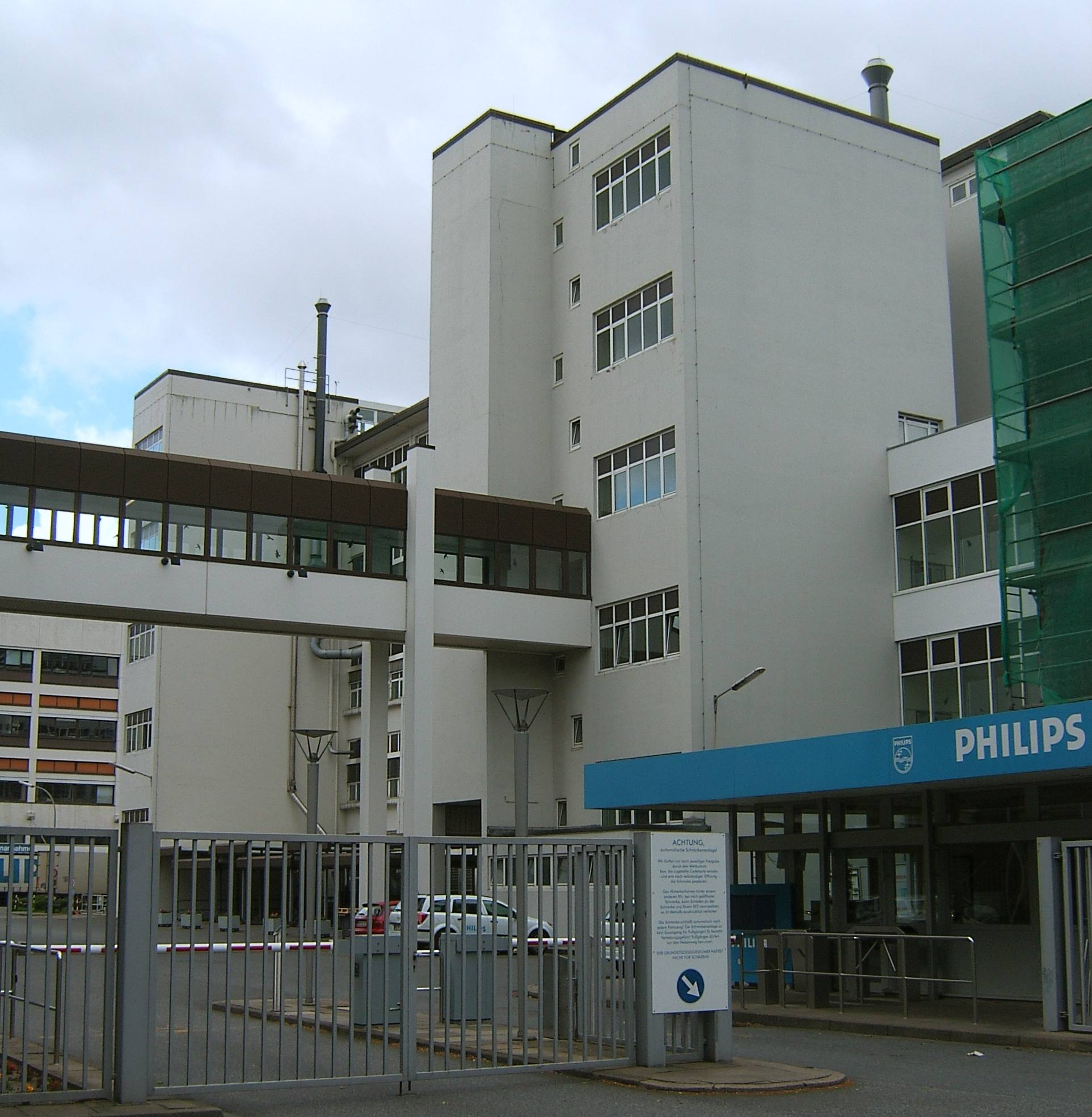 Hamburg, Fuhlsbüttel, Philips-Werk